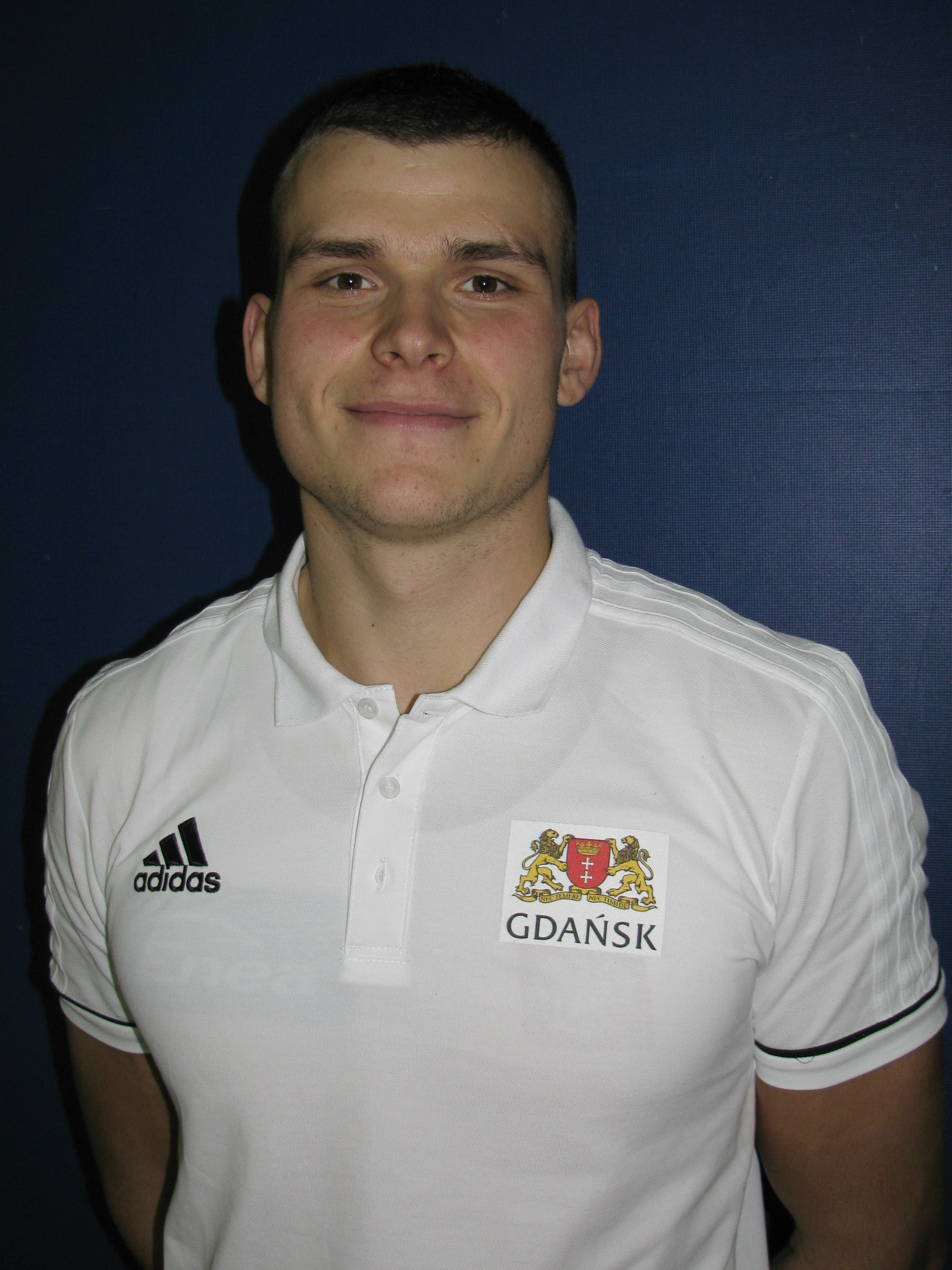 Mateusz Biskup, gdański wioślarz (olimpijczyk).